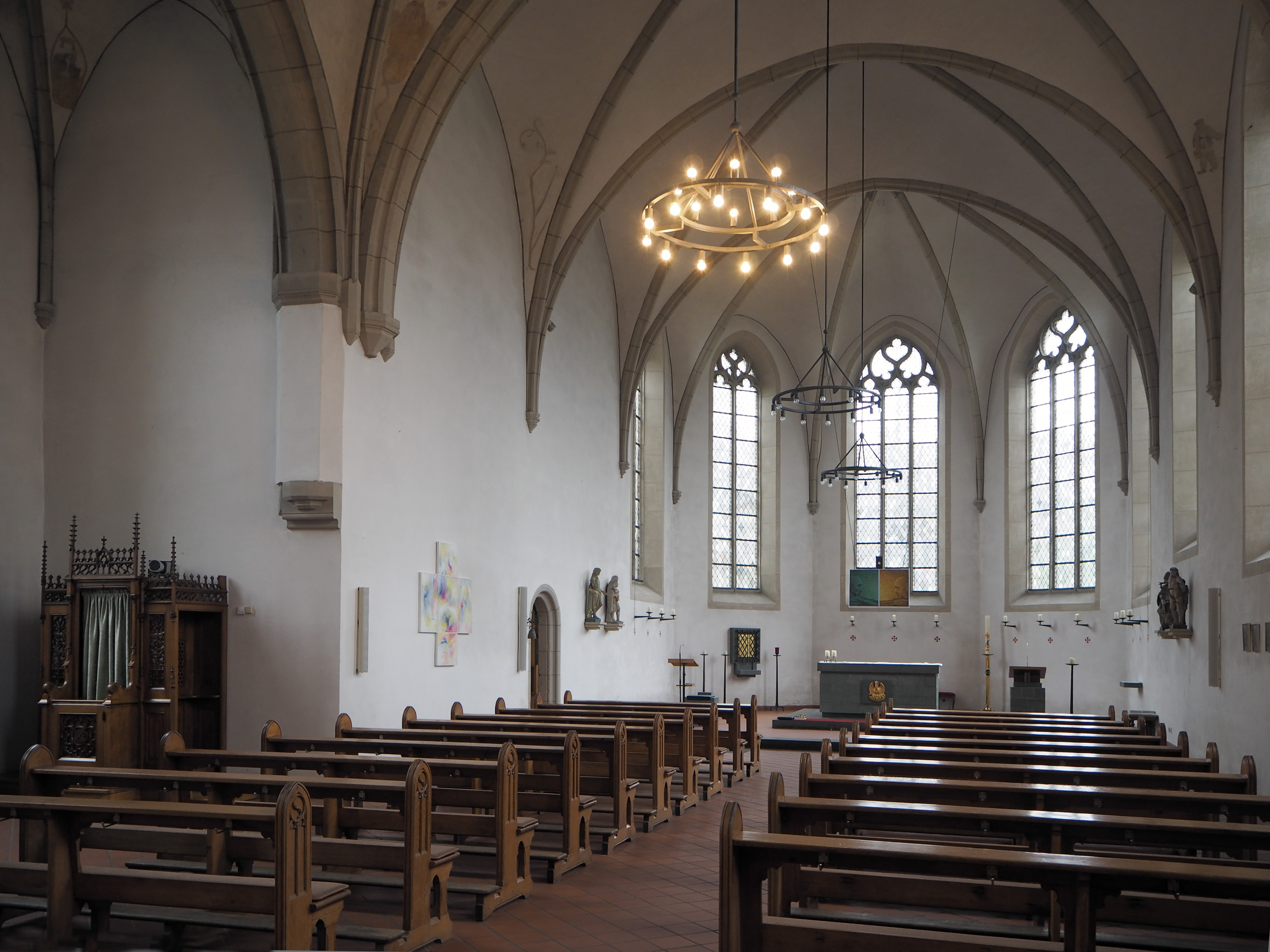 Selm (NRW), Friedenskirche Inneres, Foto: April 2017